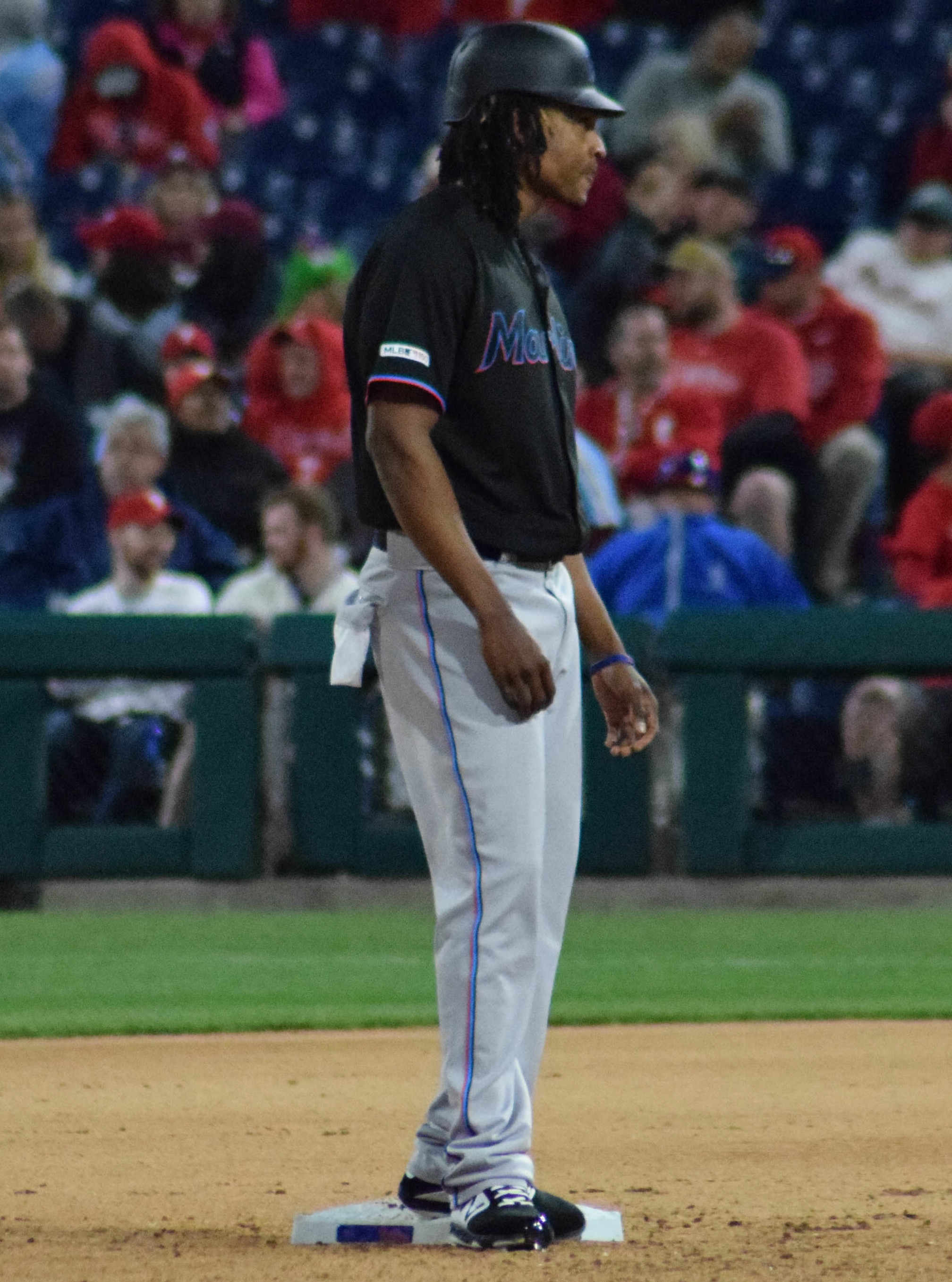 José Ureña